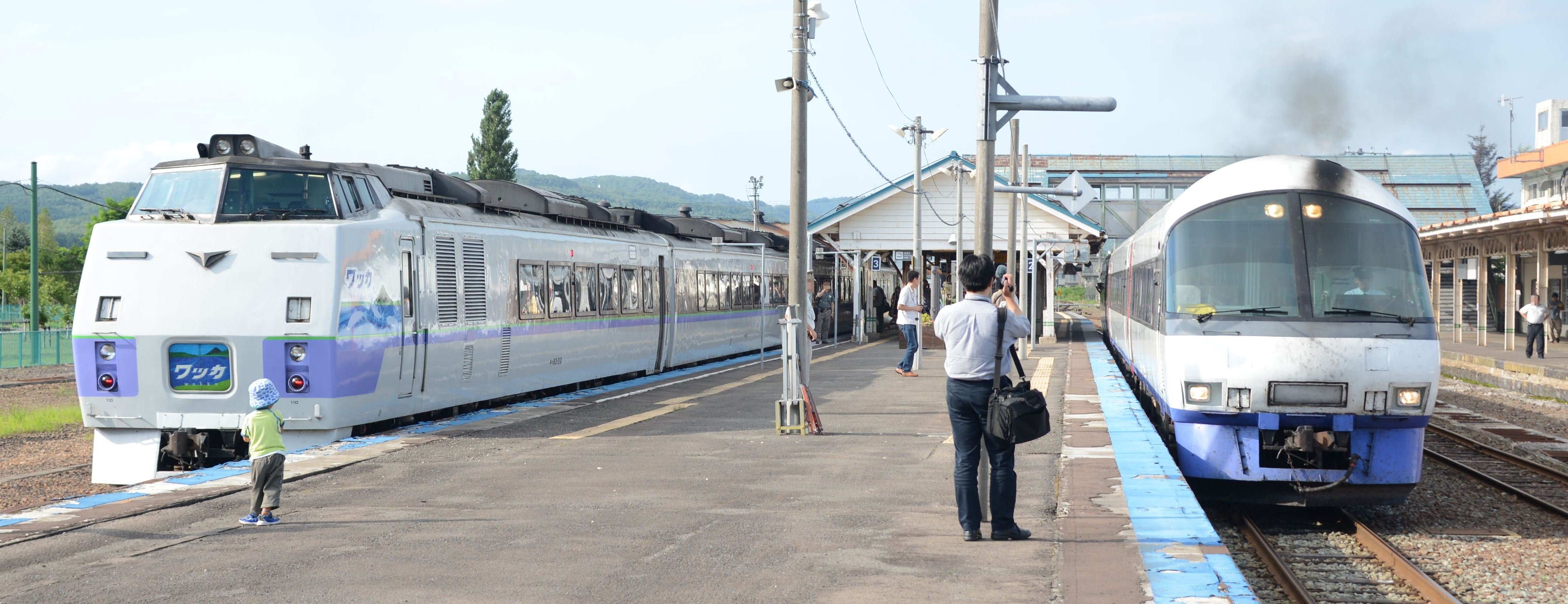 特急ワッカ号と特急ヌプリ号（倶知安駅にて）